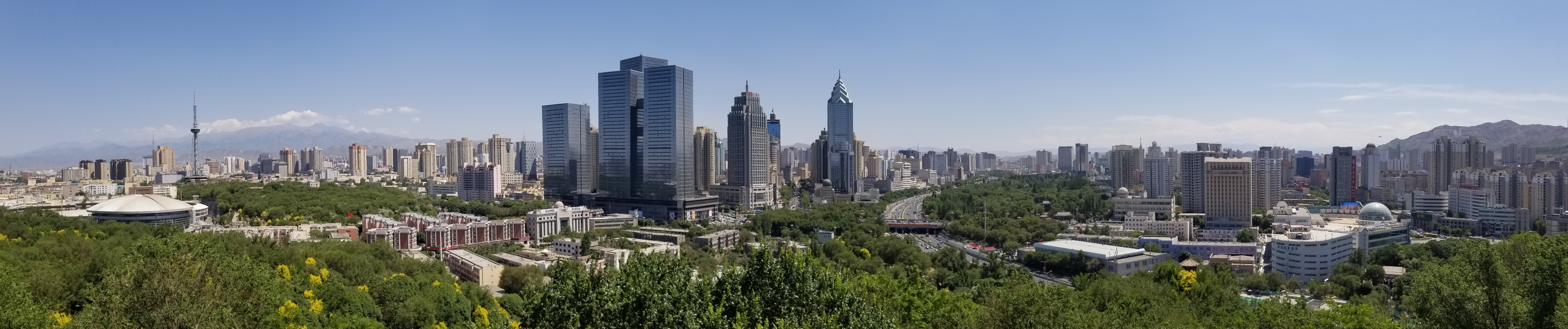 中文（中国大陆）: 红山公园小看乌市